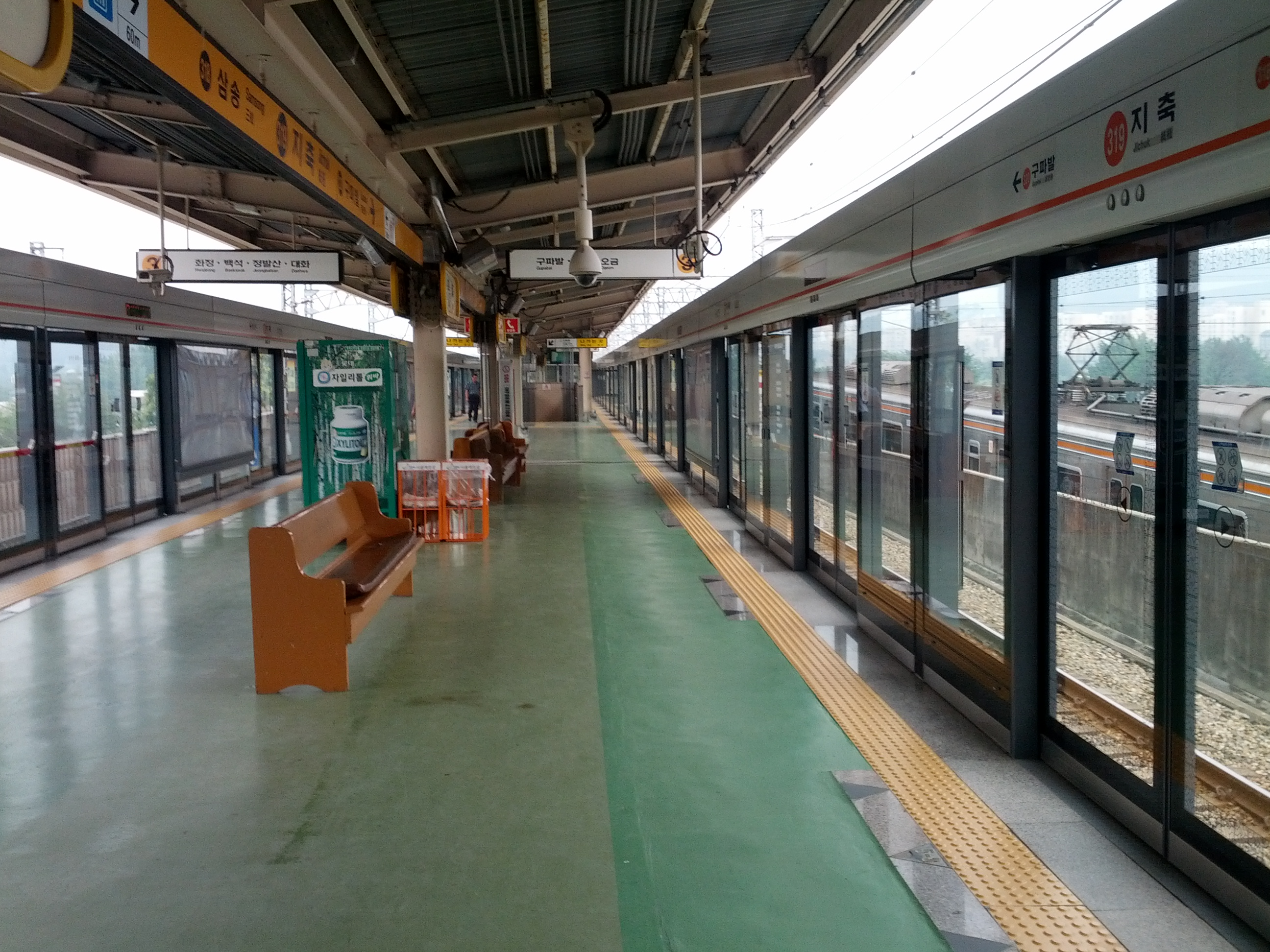 서울메트로 지축역 승강장